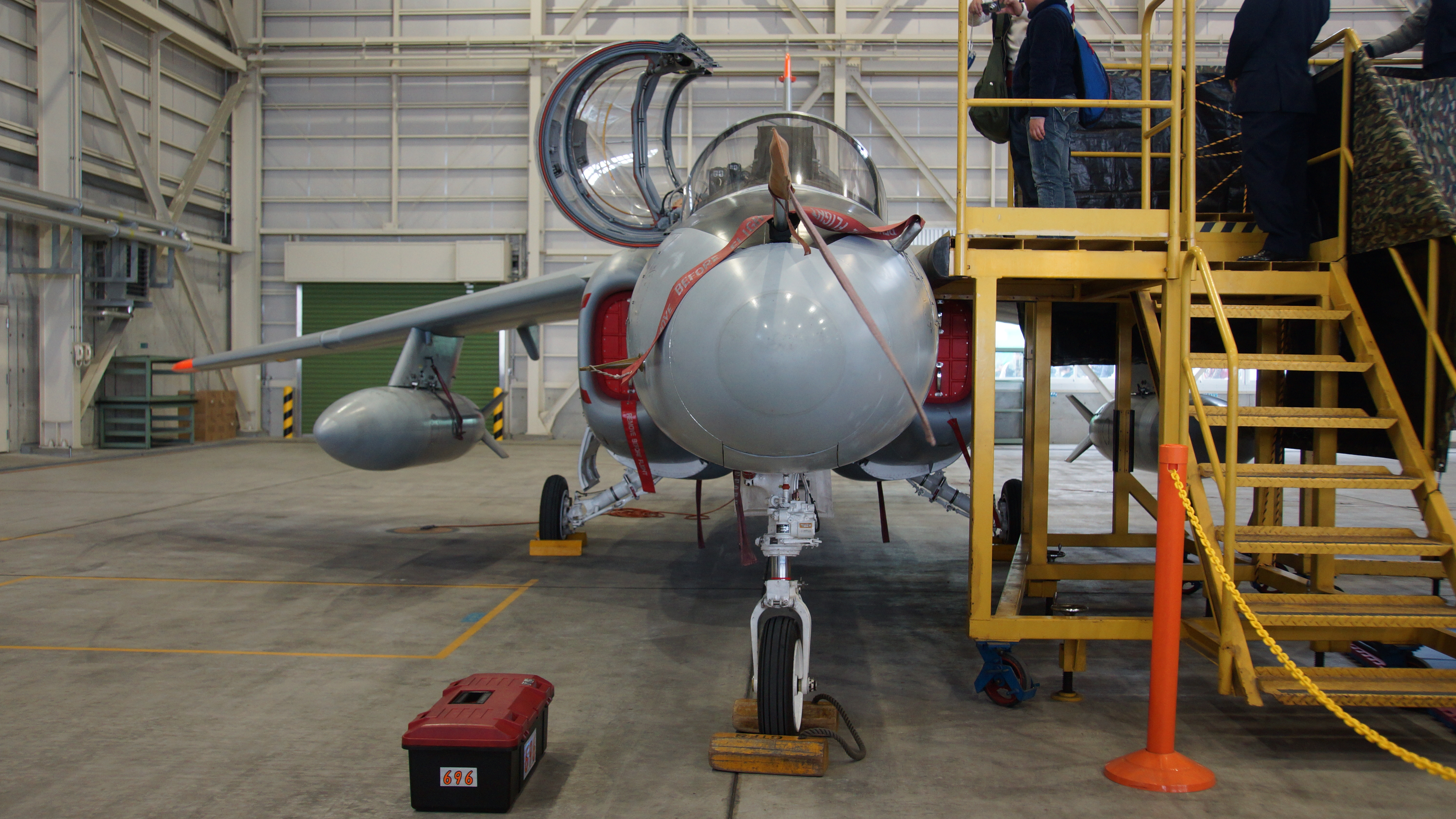 航空自衛隊 T-4練習機（36-5696号機） 正面。2017年11月26日 築城基地にて。